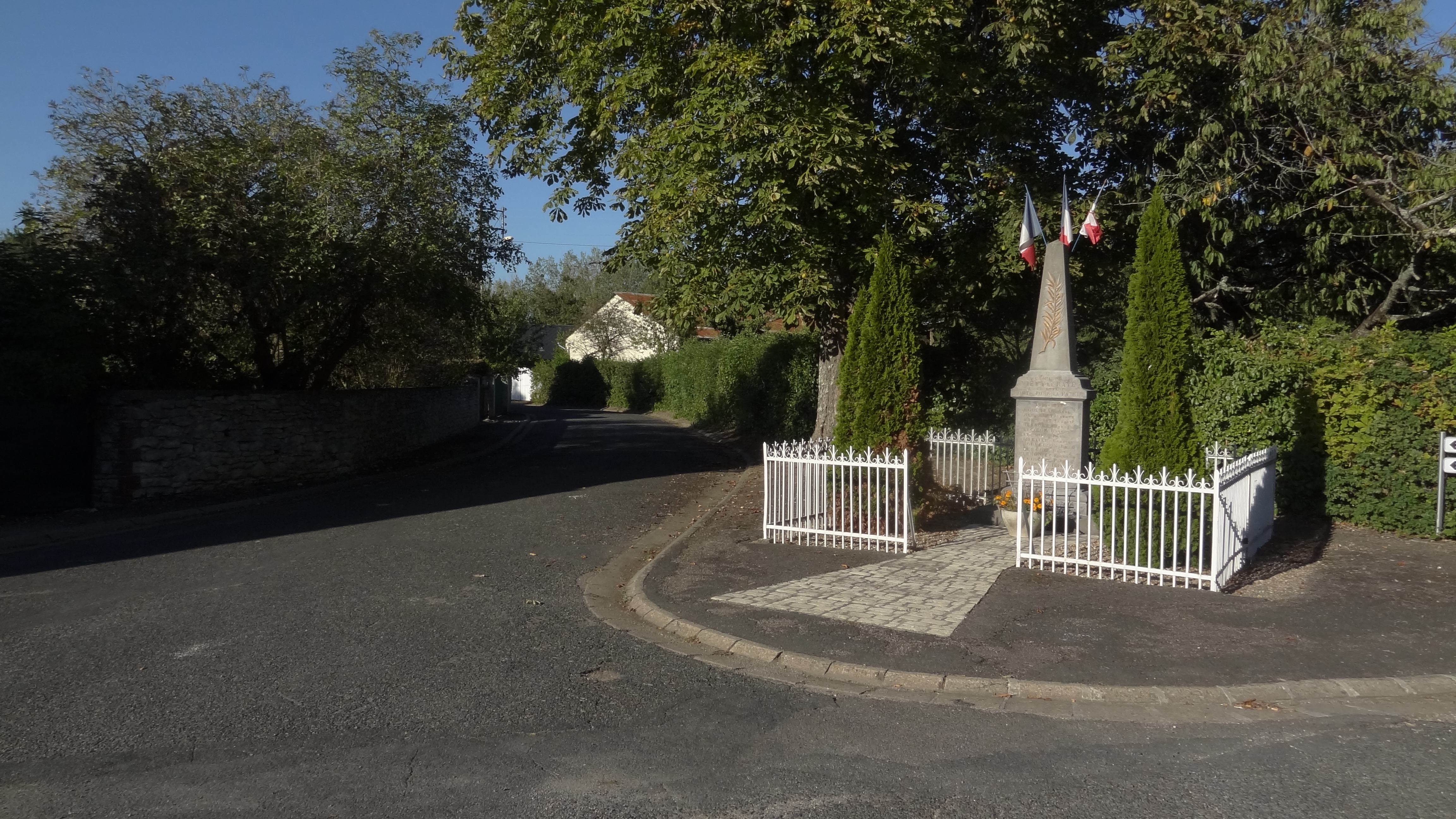 Monument aux mort, Vievy-le-Rayé, Loir-et-Cher, France